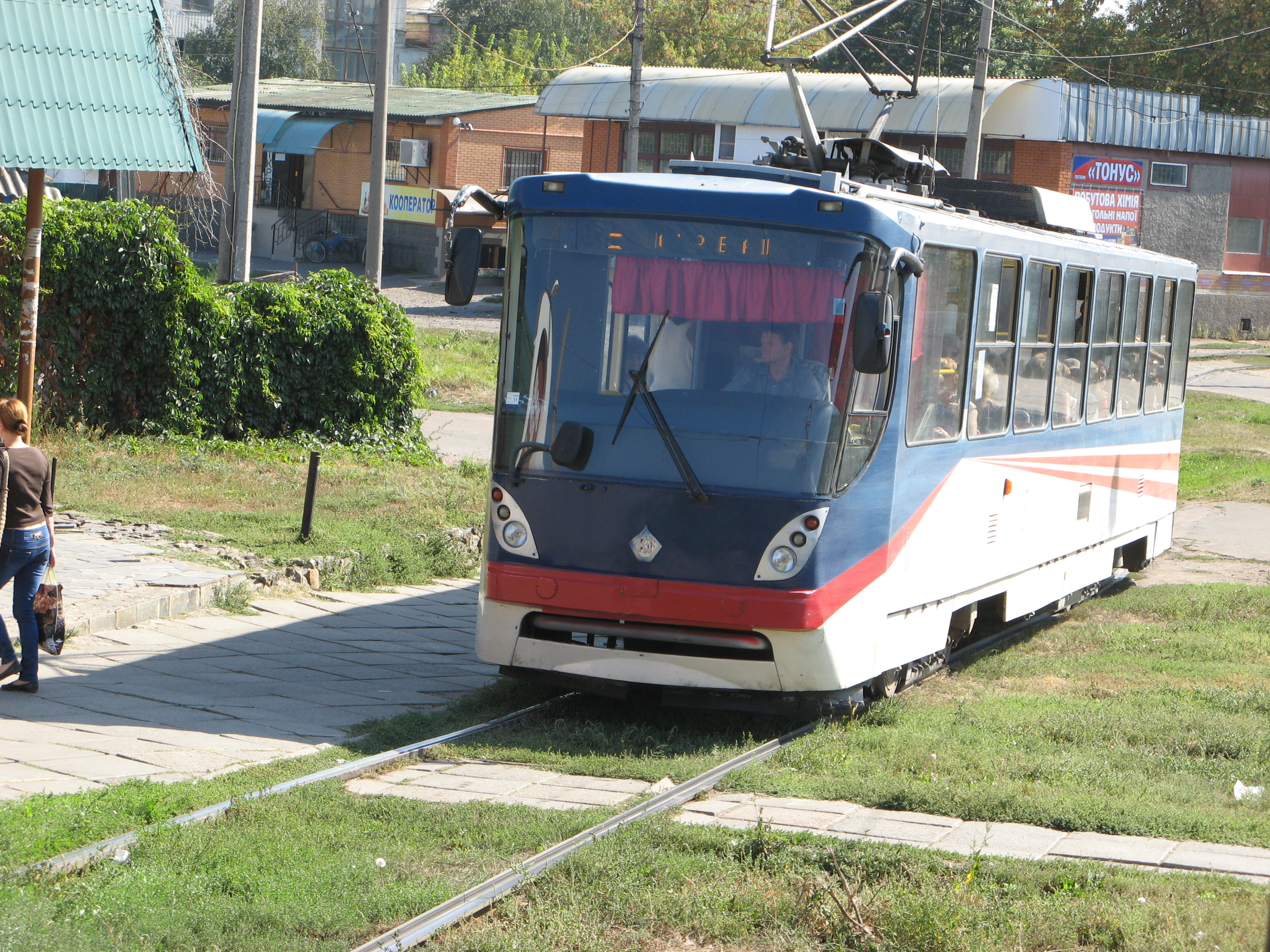 Конотопський трамвай, K-1